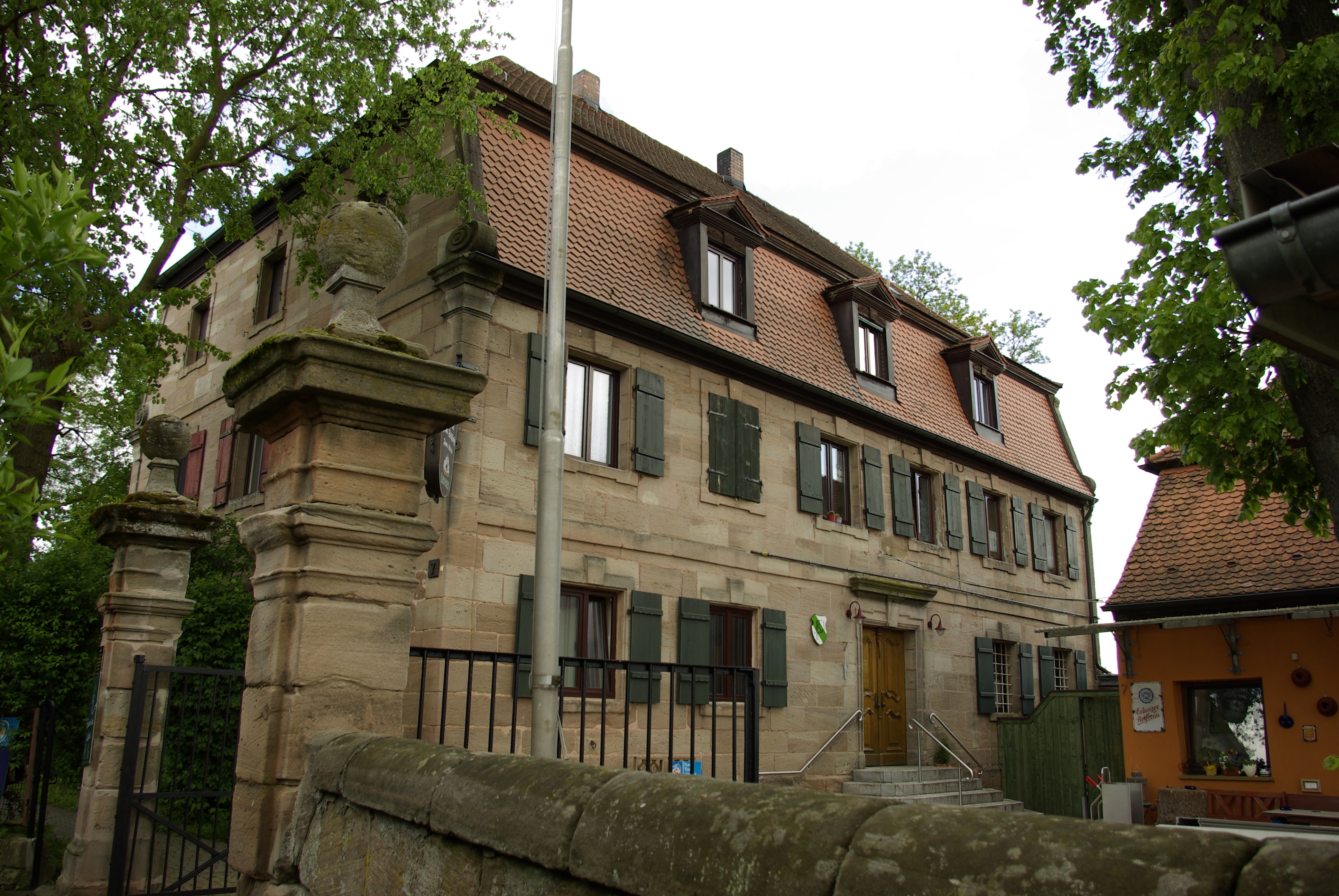 Ehemaliges Schloss im Erlanger Stadtteil Tennenlohe. 1777 bis 1782 durch den Nürnberger Patrizier Jakob Gottlieb Rudolf von Volckamer errichtet und bis 1826 in Besitz der Familie. Seit 1835 Eigentum der Familie Klein. Seit 1860 Gaststätte. Vorgängerbauten seit dem 14. Jahrhundert.